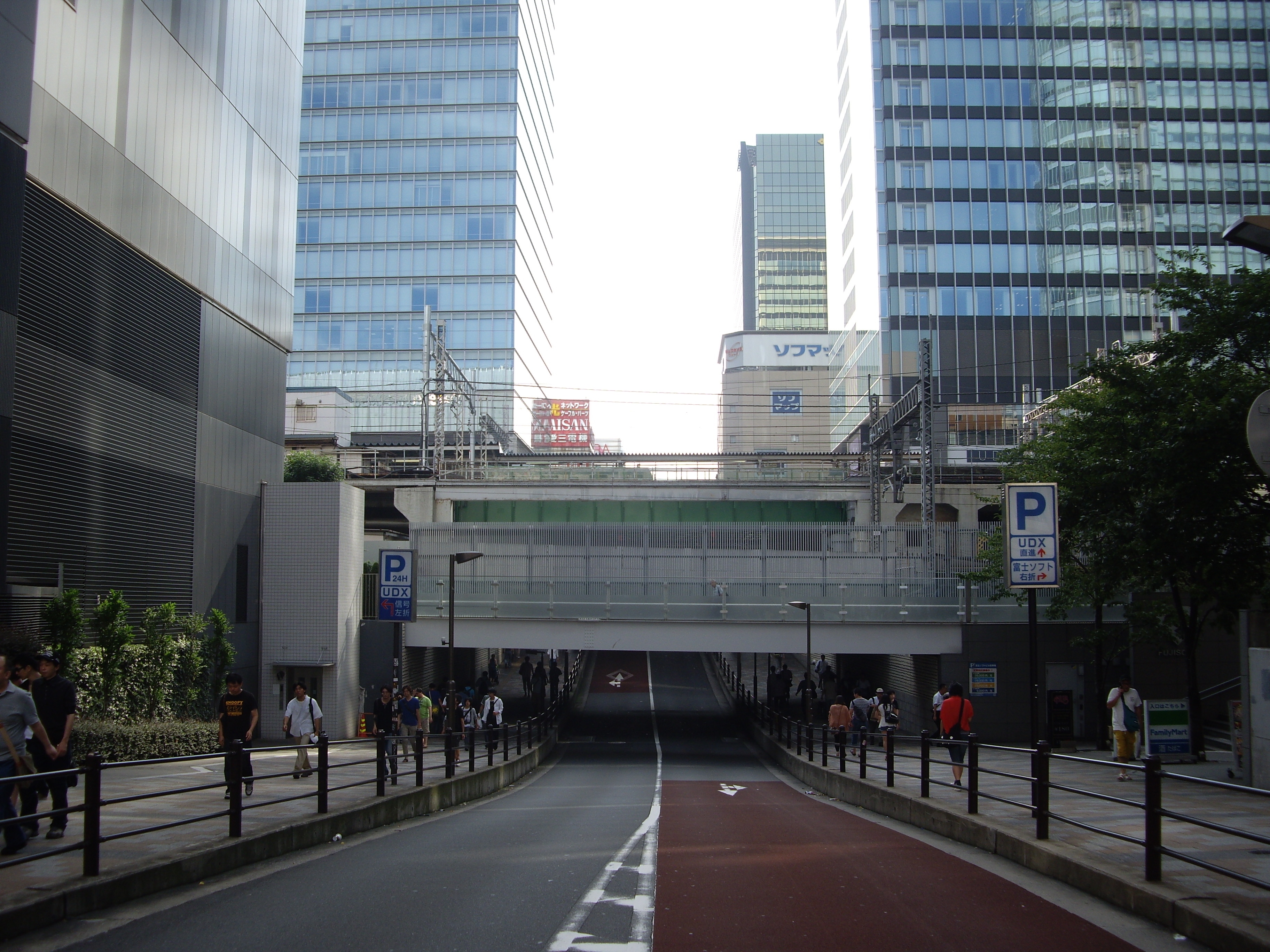 神田相生町